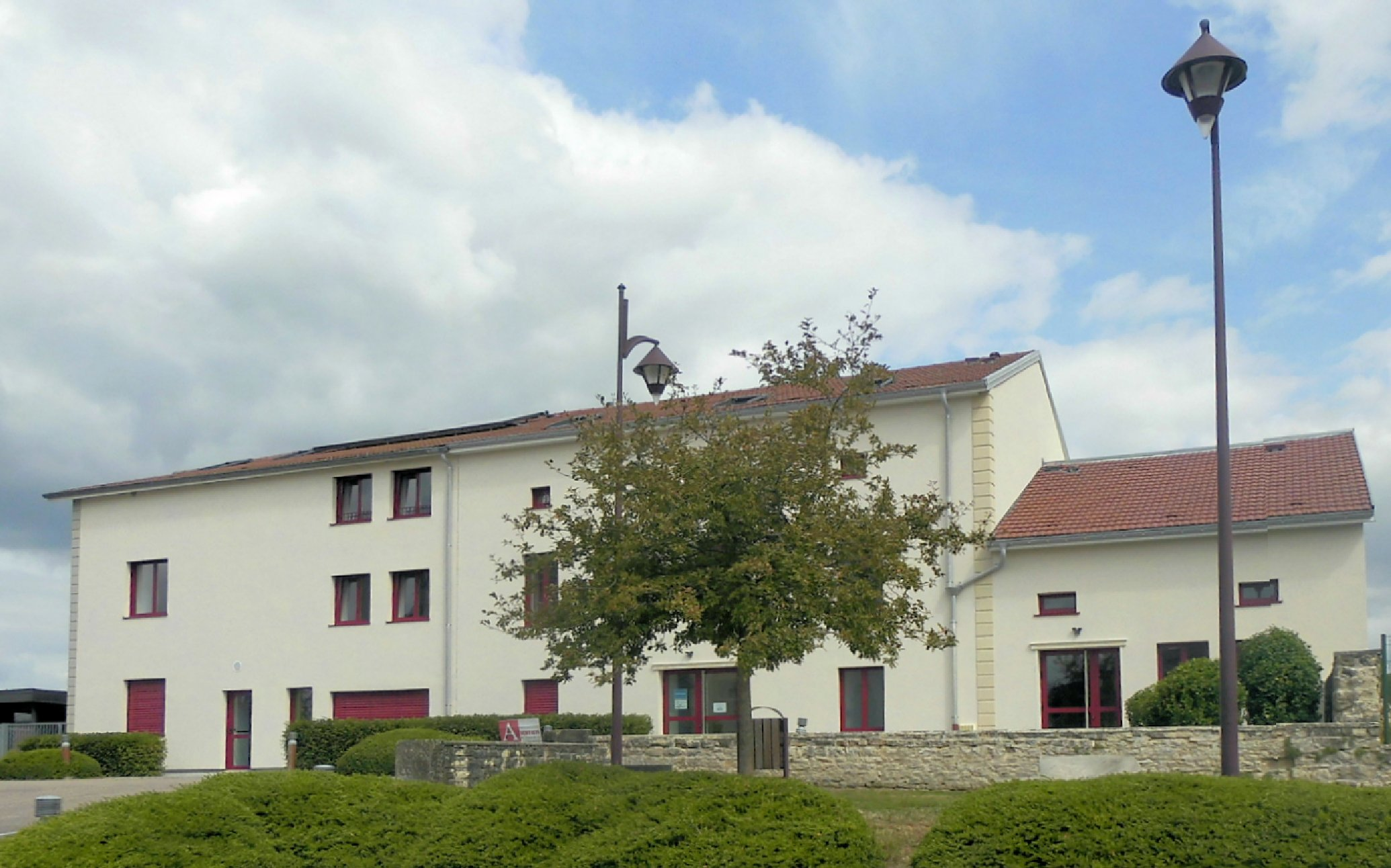 La mairie-école d'Haréville